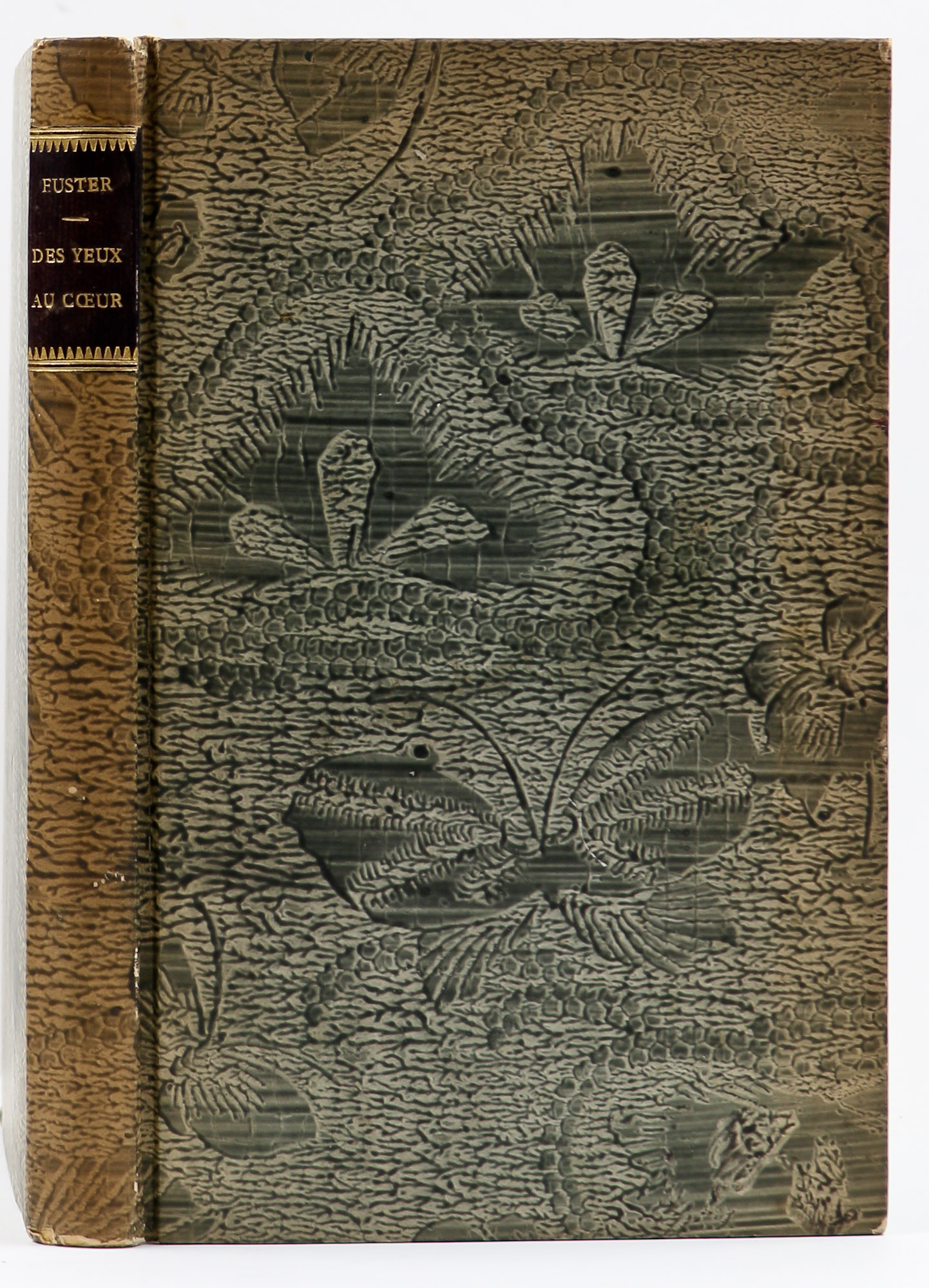 Reliure de René Wiener. BmN : cote 314 019